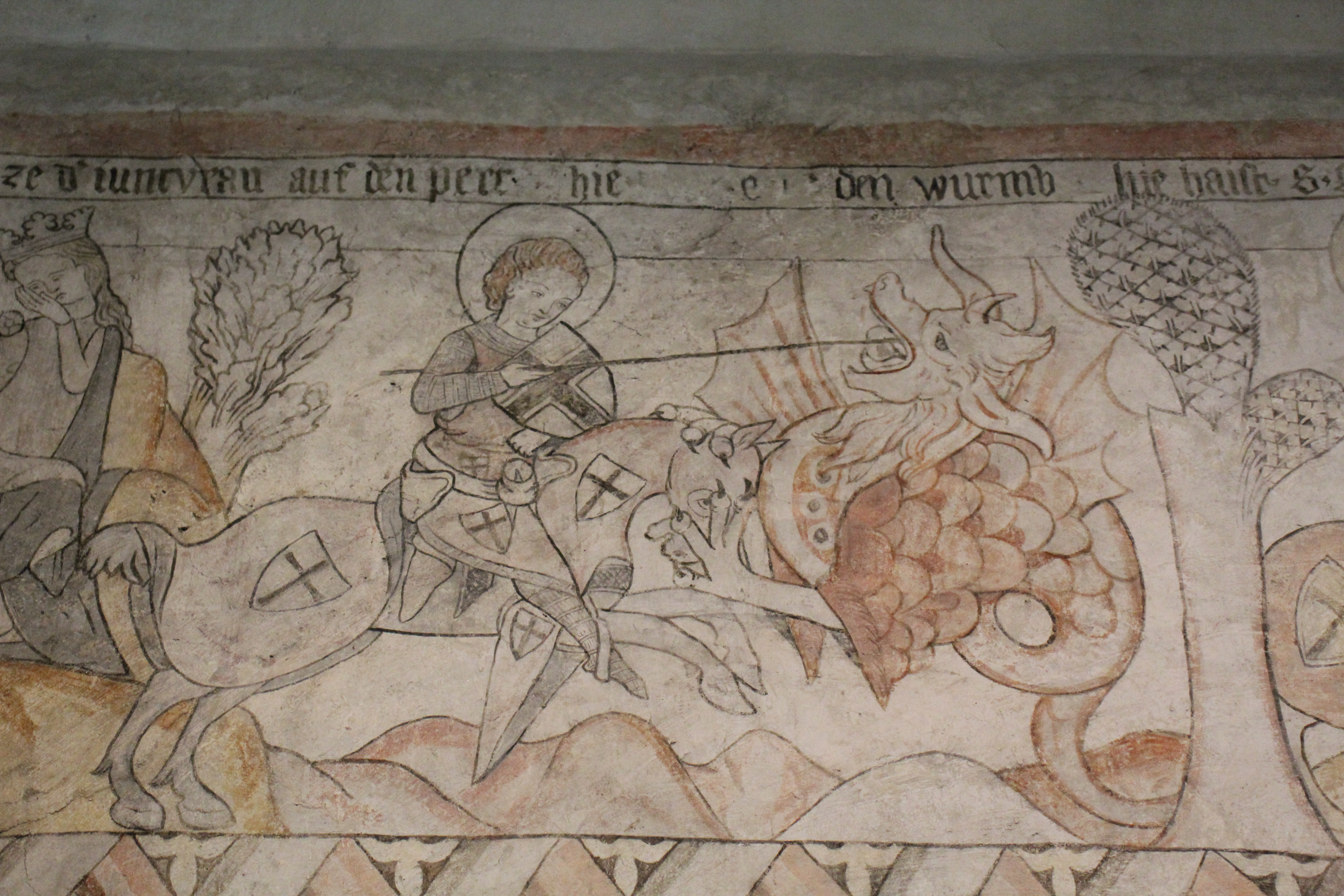 Sál se svatojiřskou legendou, sv. Jiří bojující s drakem v horním pásu.